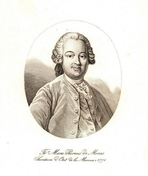 Portrait de François-Marie Peyrenc de Moras, gravé par Louis-Simon Lempereur, d'après un tableau de Jean Valade (1710-1787) Il devint secrétaire d'Etat à la Marine en 1757